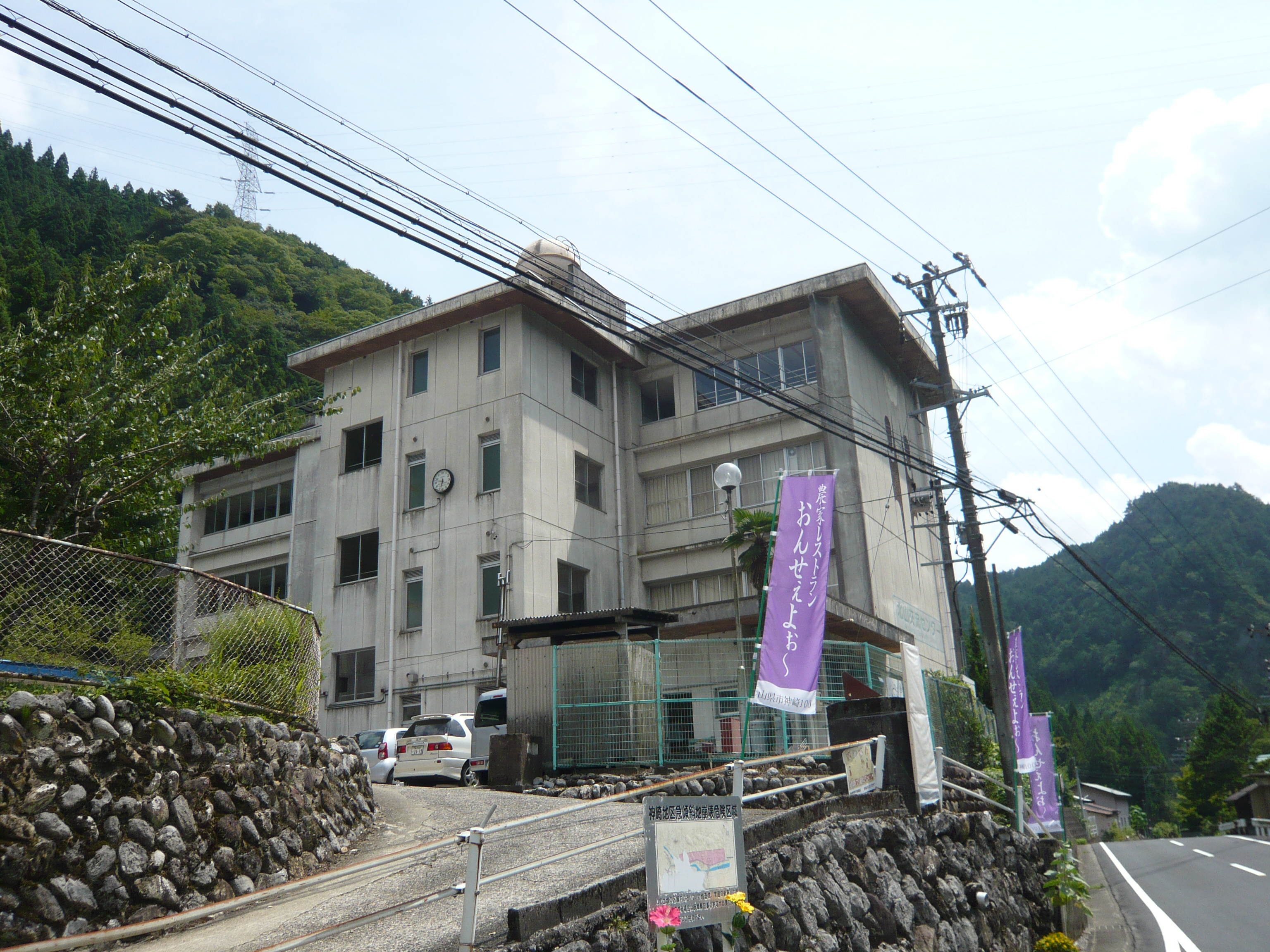 旧北山小学校